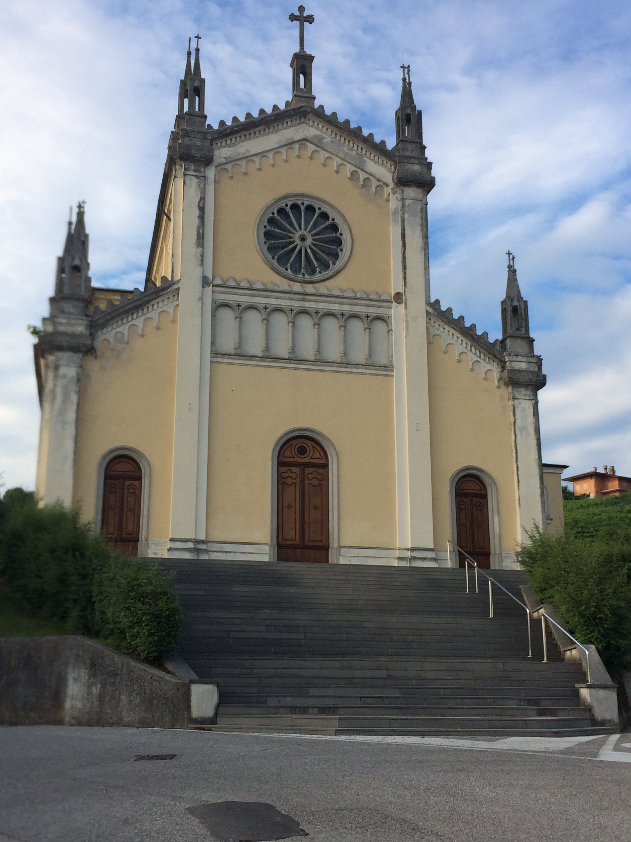 Povoletto - Chiesa San Michele Arcangelo - Savorgnano